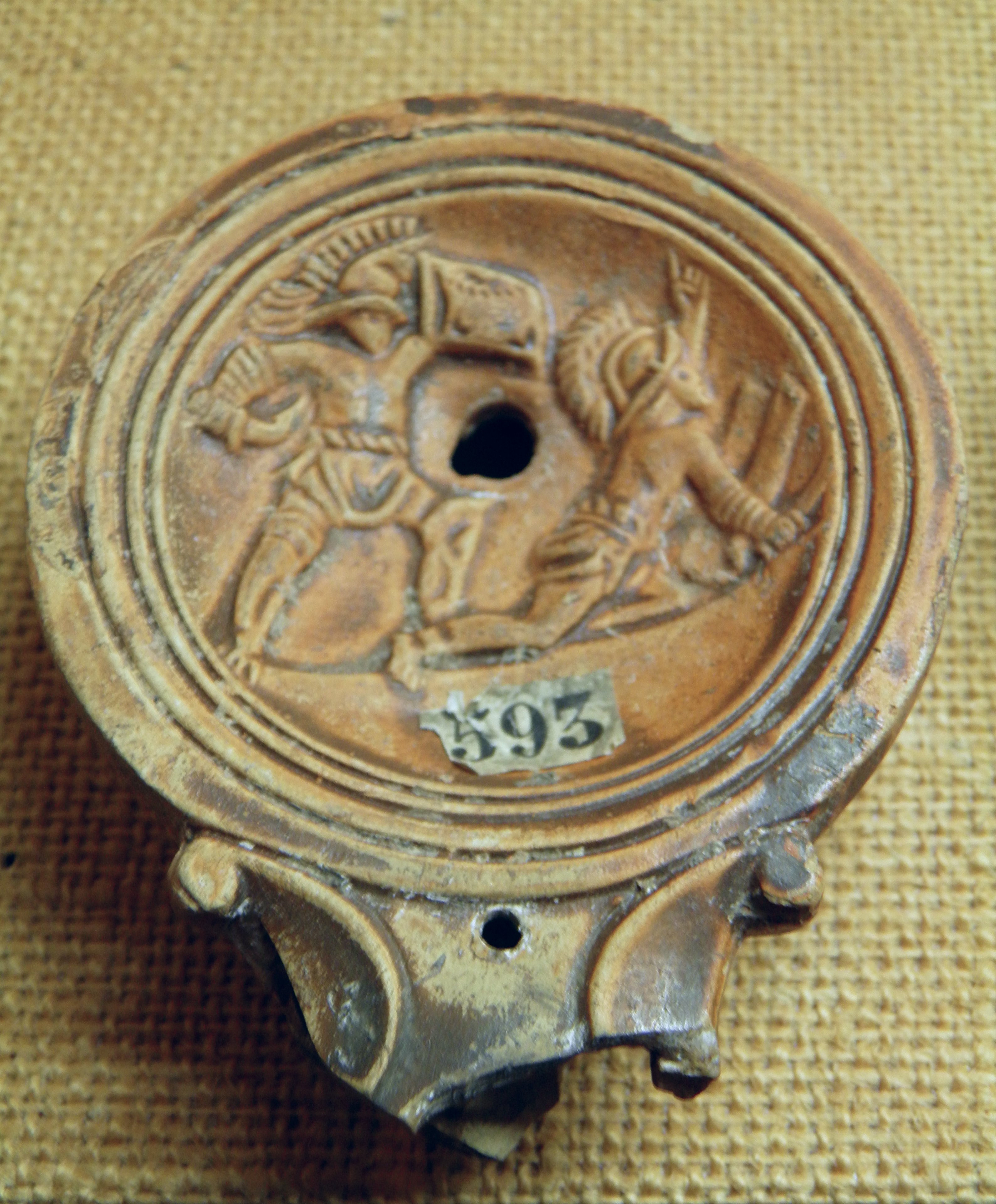 Terracotta oil lamp with gladiatoral scene, Musée gallo-romain de Fourvière, Lyon